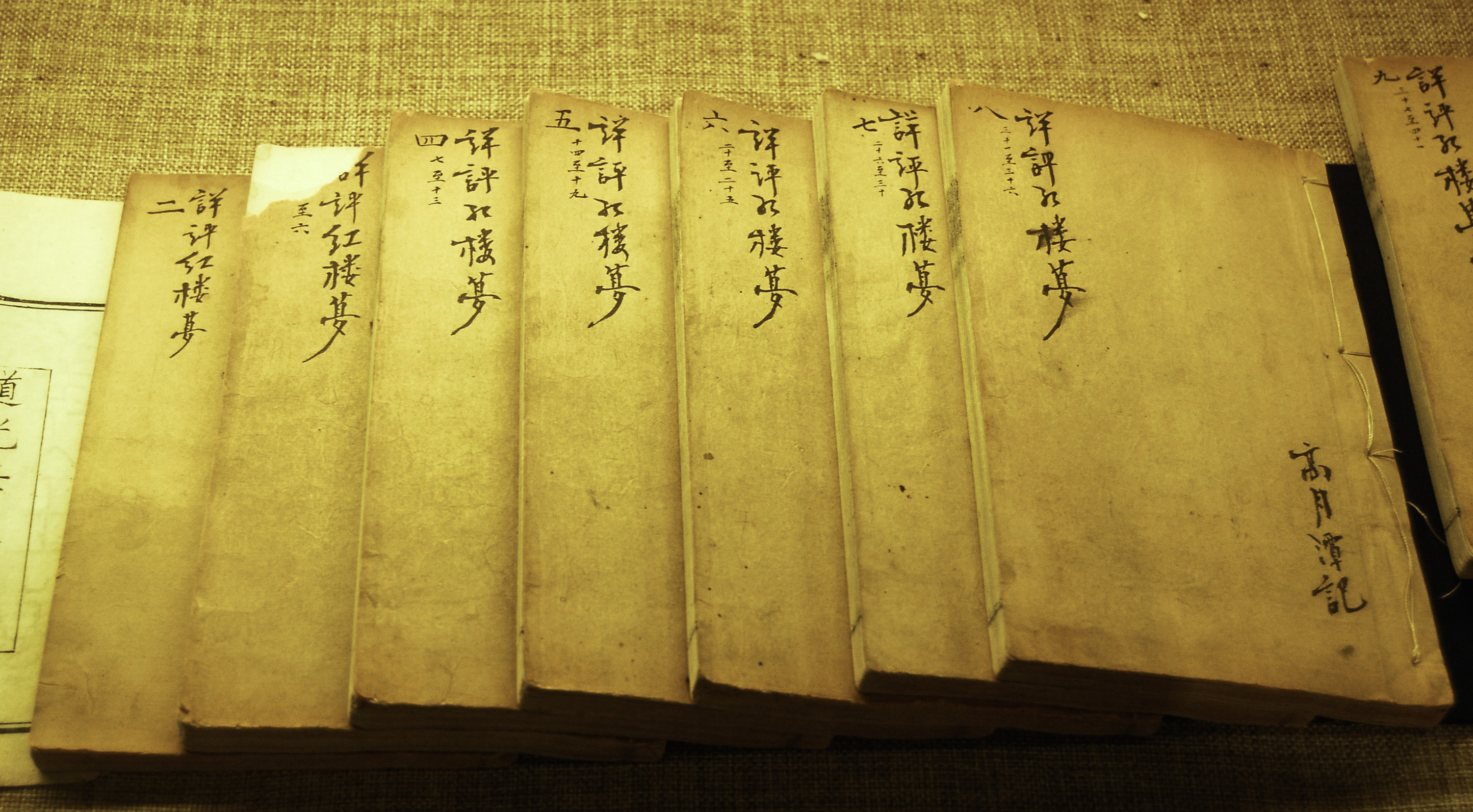 高月谭详评红楼梦